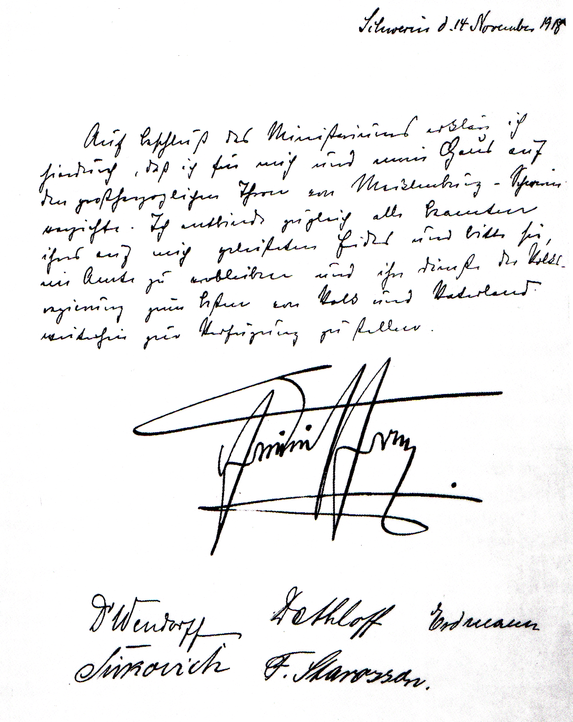 Abdankungsurkunde von Friedrich Franz IV vom 14.November 1918. Mit der Abdankung endete die Monarchie in Mecklenburg.